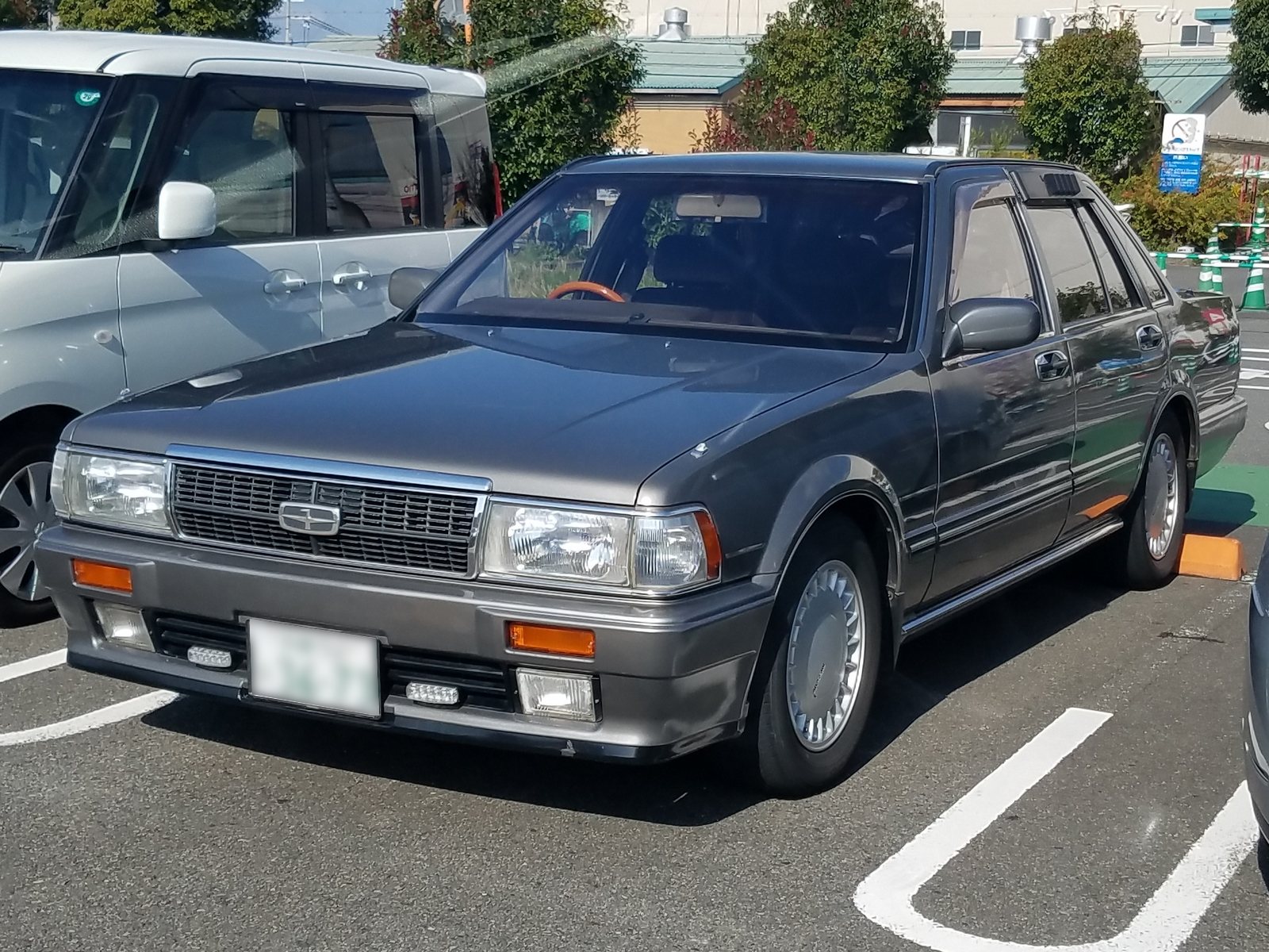 グロリア セダングランツーリスモSV（前期型）